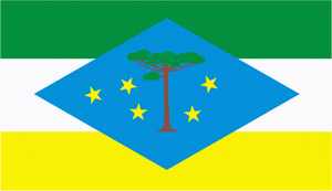 Bandeira de Laranjeiras do Sul